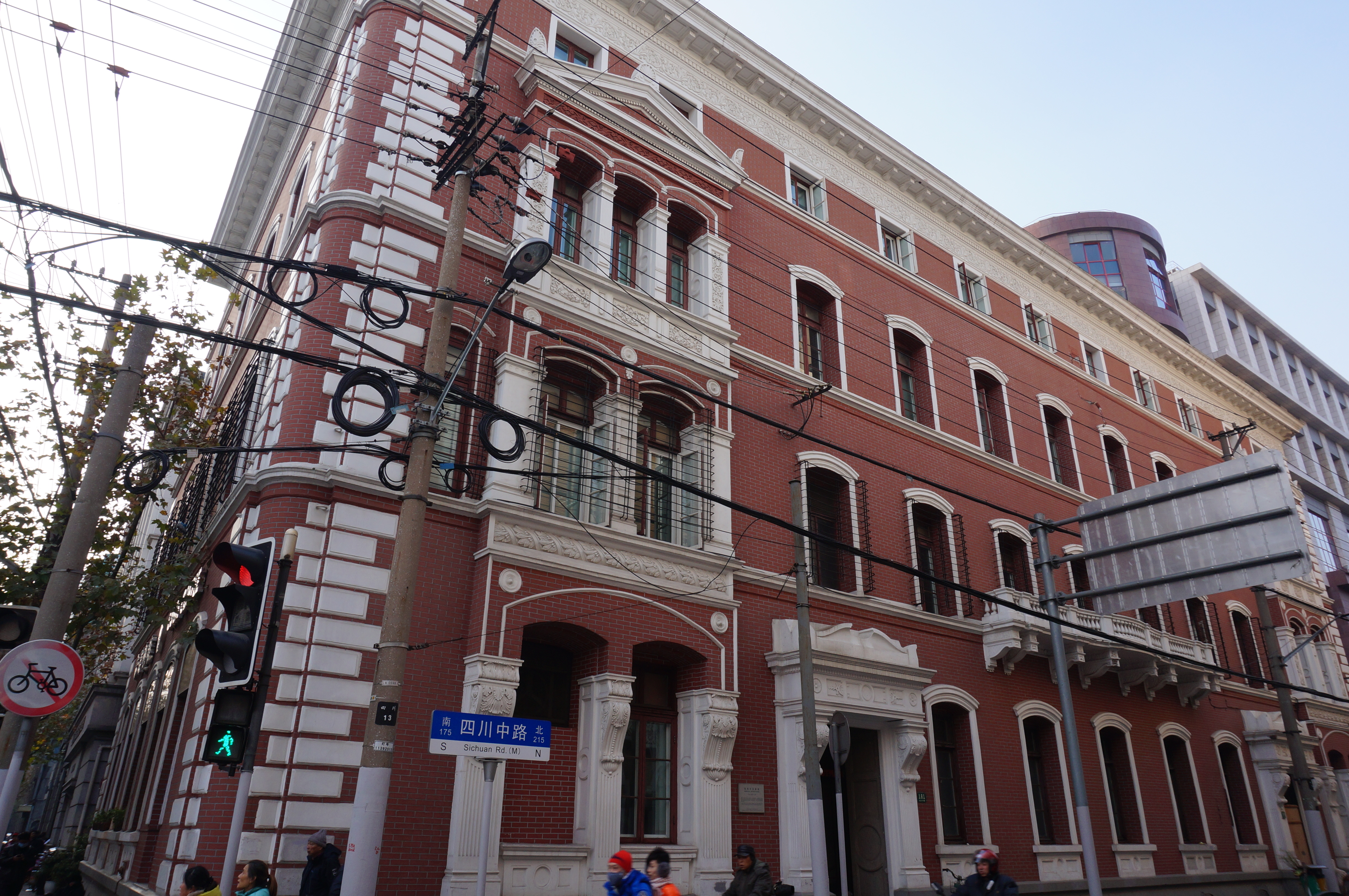 中文（中国大陆）: 原三井物产公司上海支店